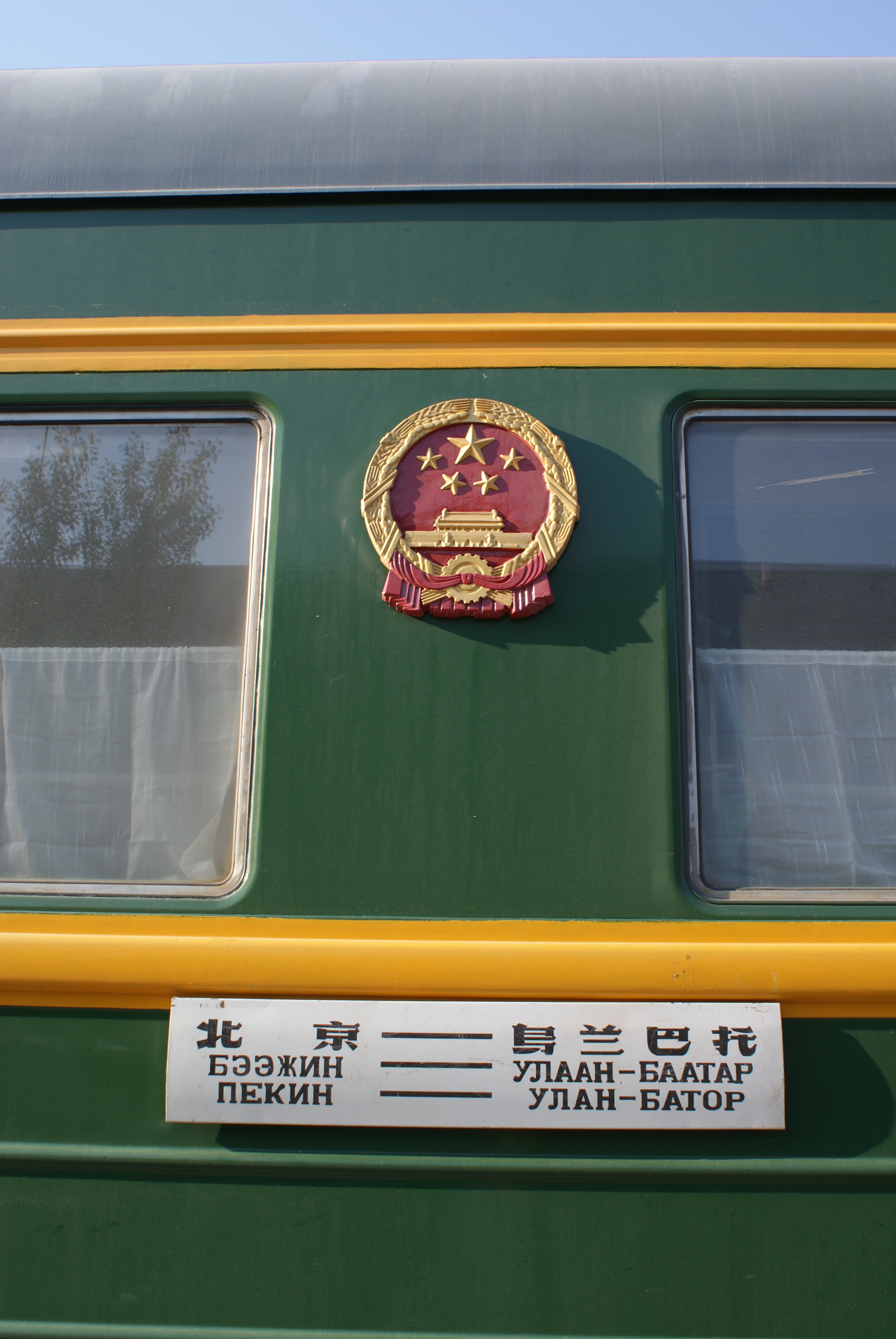 Beijing-Ulaan Baatar Train Information board